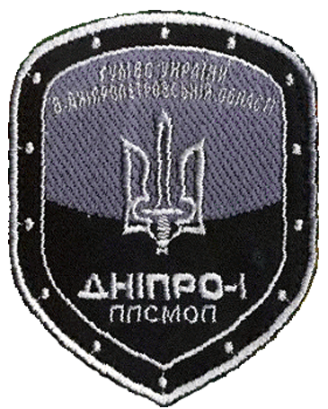 Eмблема добровольчого полку патрульної служби міліції особливого призначення (ППСМОП), створеного у квітні 2014 року у структурі ГУ МВС України в Дніпропетровській області як батальйон «Дніпро-1».